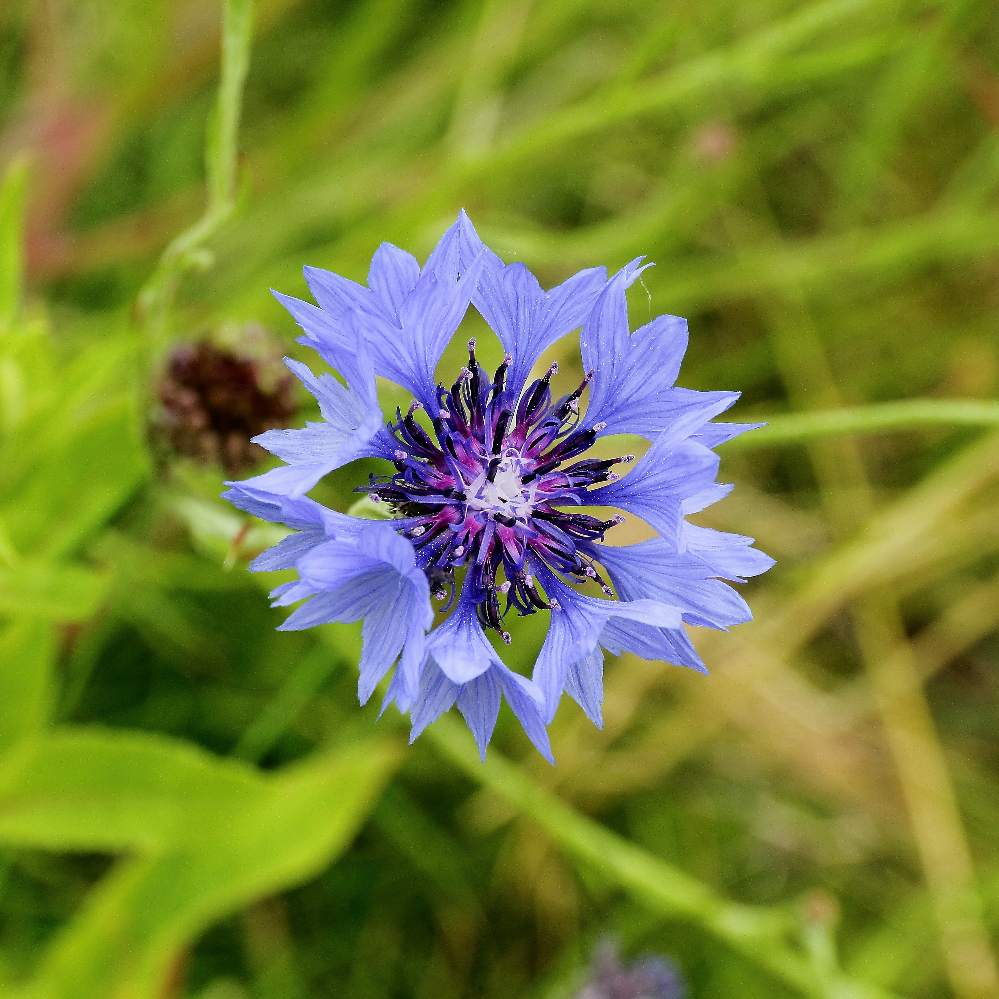 Cyanus segetum i Bergianska trädgården.